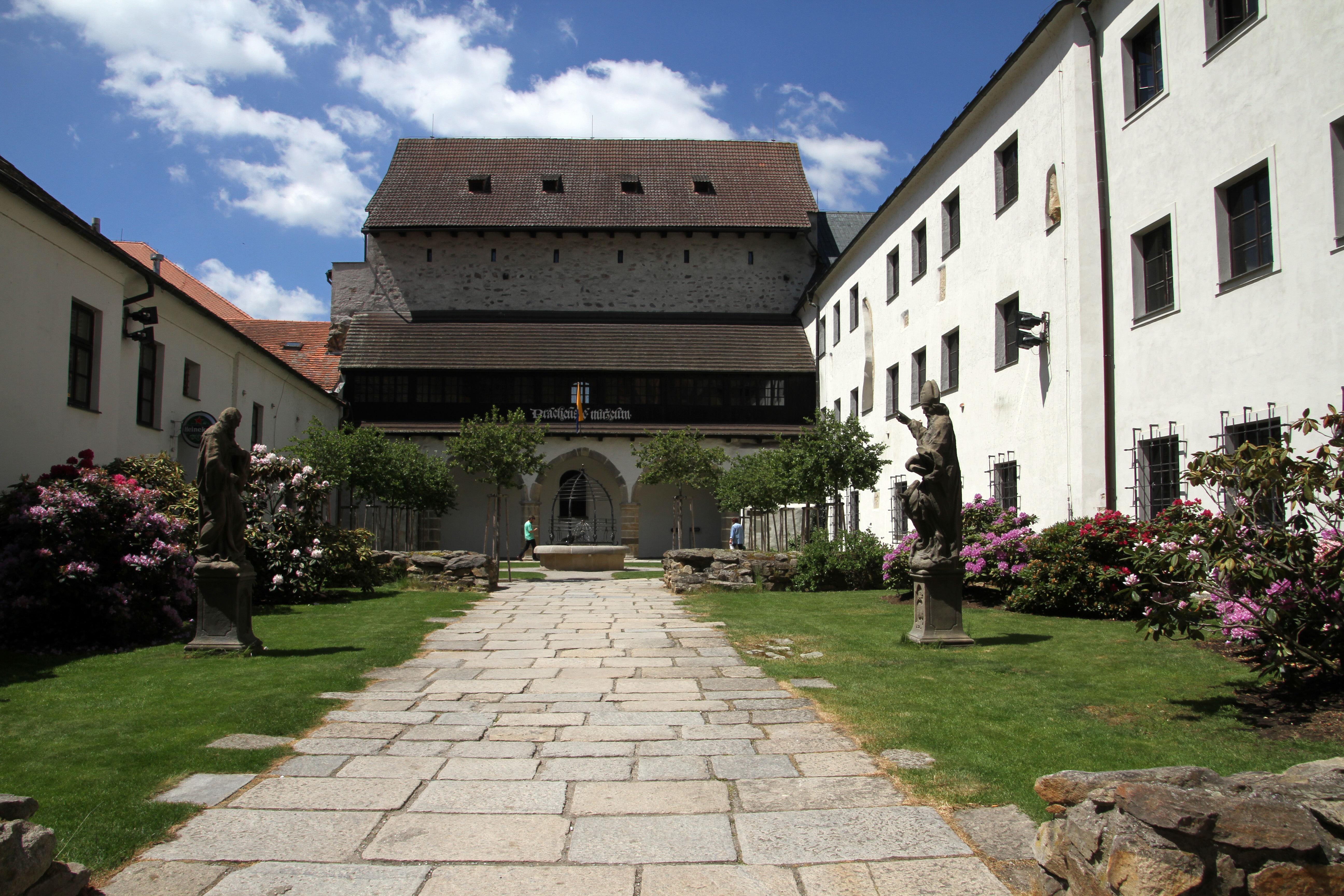 Písek